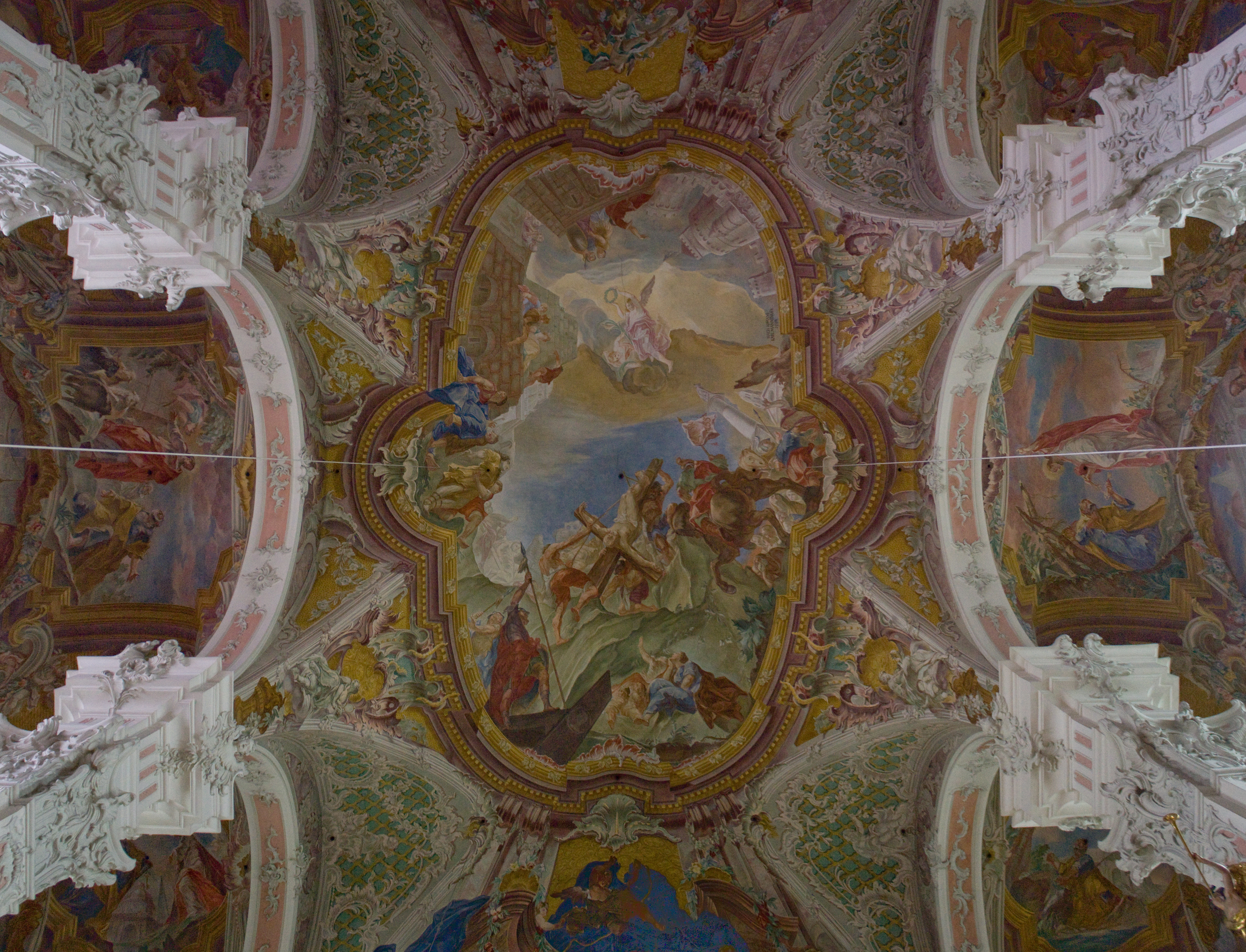 Petersplatz 9, Mainz - Katholische Pfarrkirche St Peter